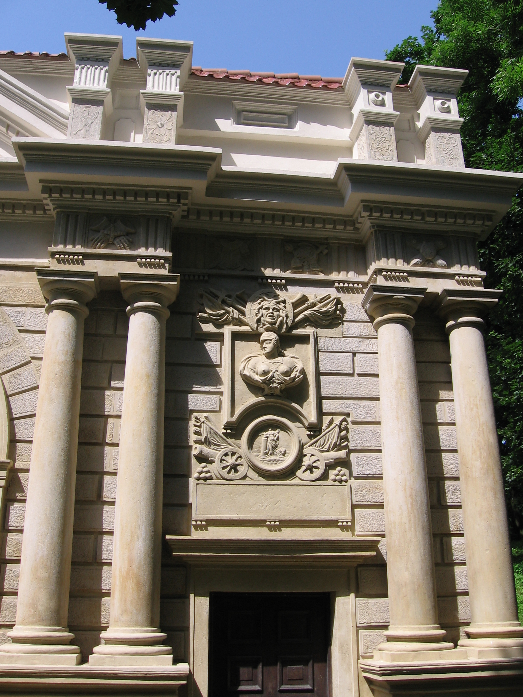 Zespół zamku Radziwiłłów